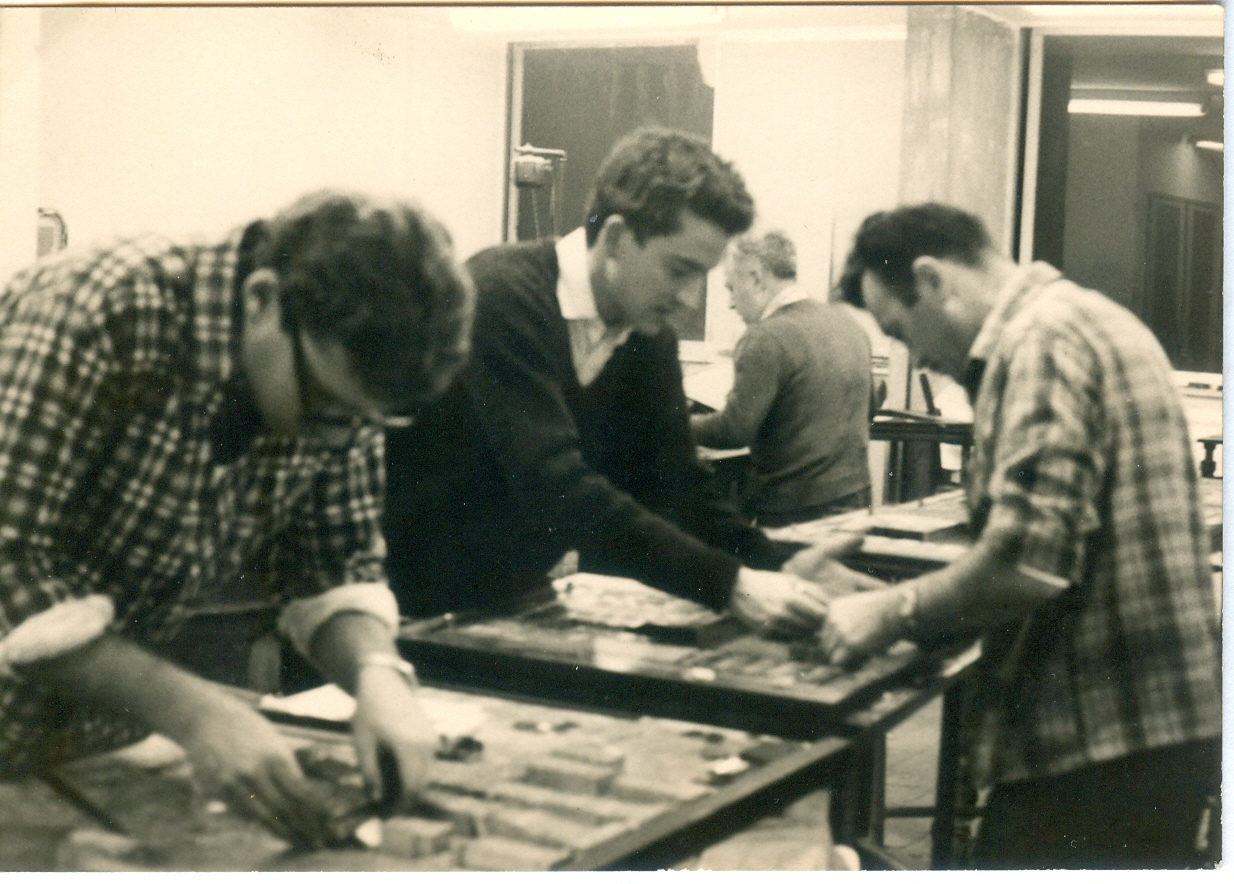 Yosef Ahimeir משמרת לילה בעיתון "היום" בתל אביב, 1969. במרכז: העורך יוסי אחימאיר